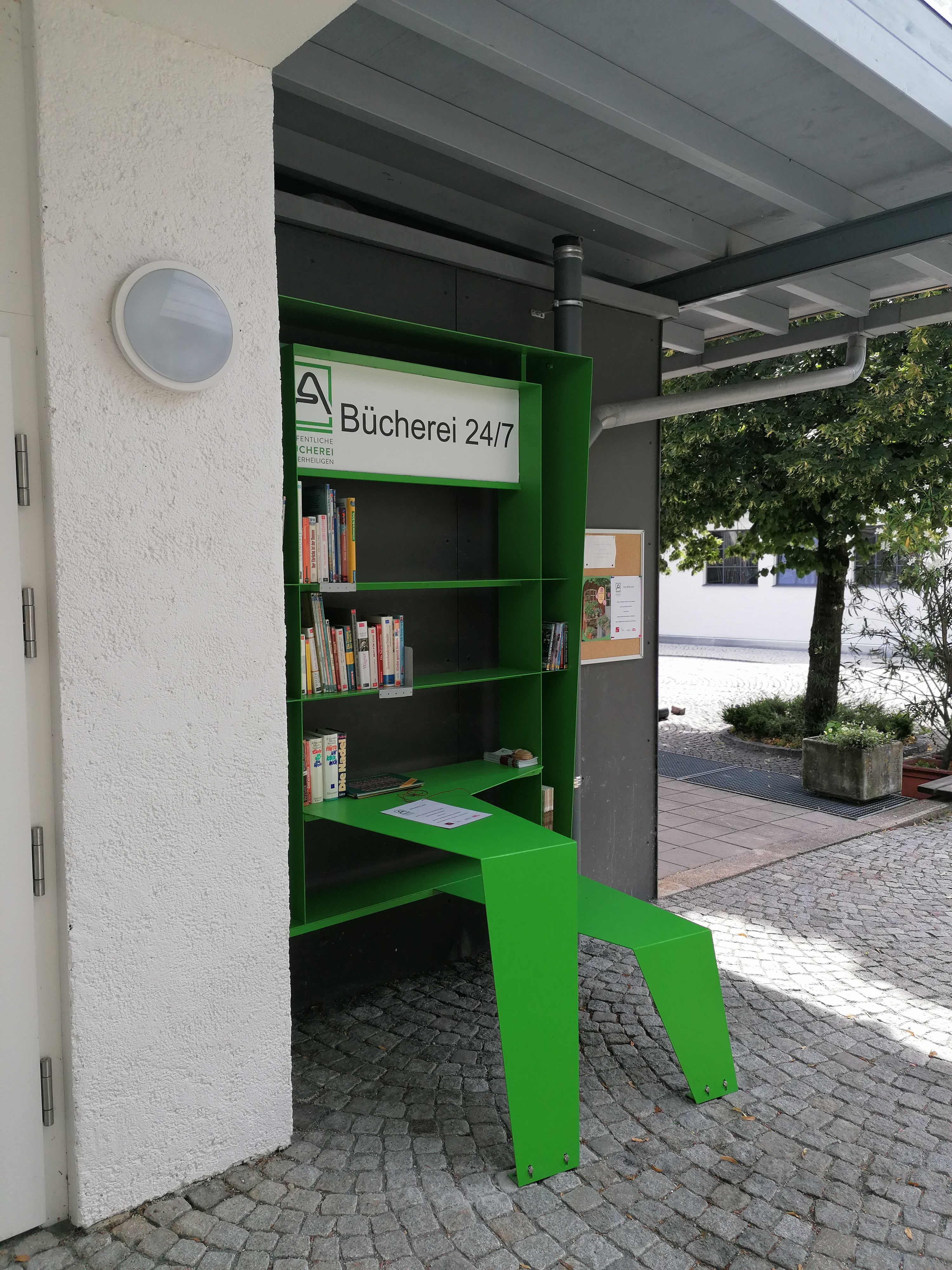 Leseplatz und öffentlicher Bücherschrank vor der Bücherei Innsbruck Allerheiligen